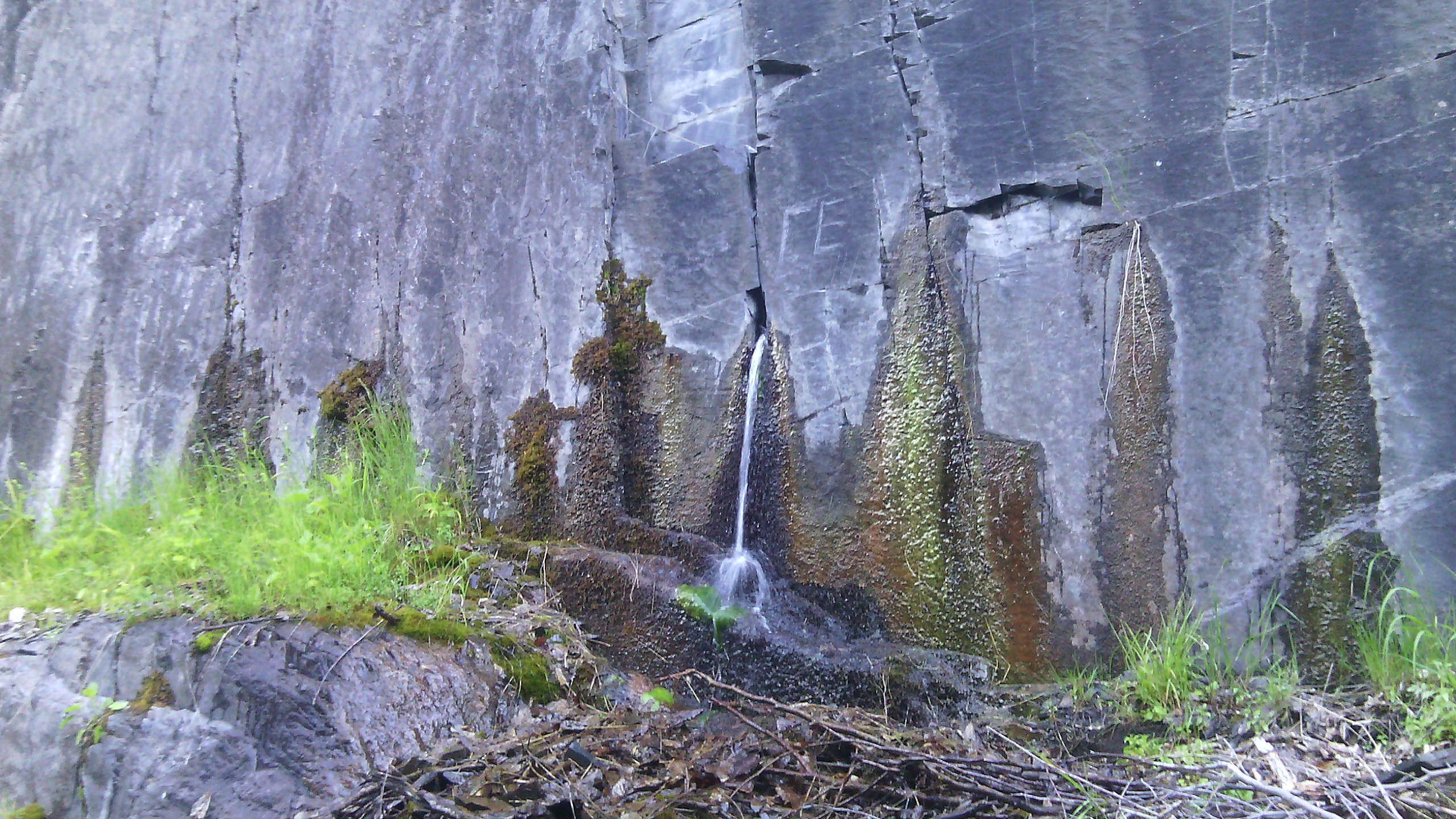 İlisu. Şəlalə.